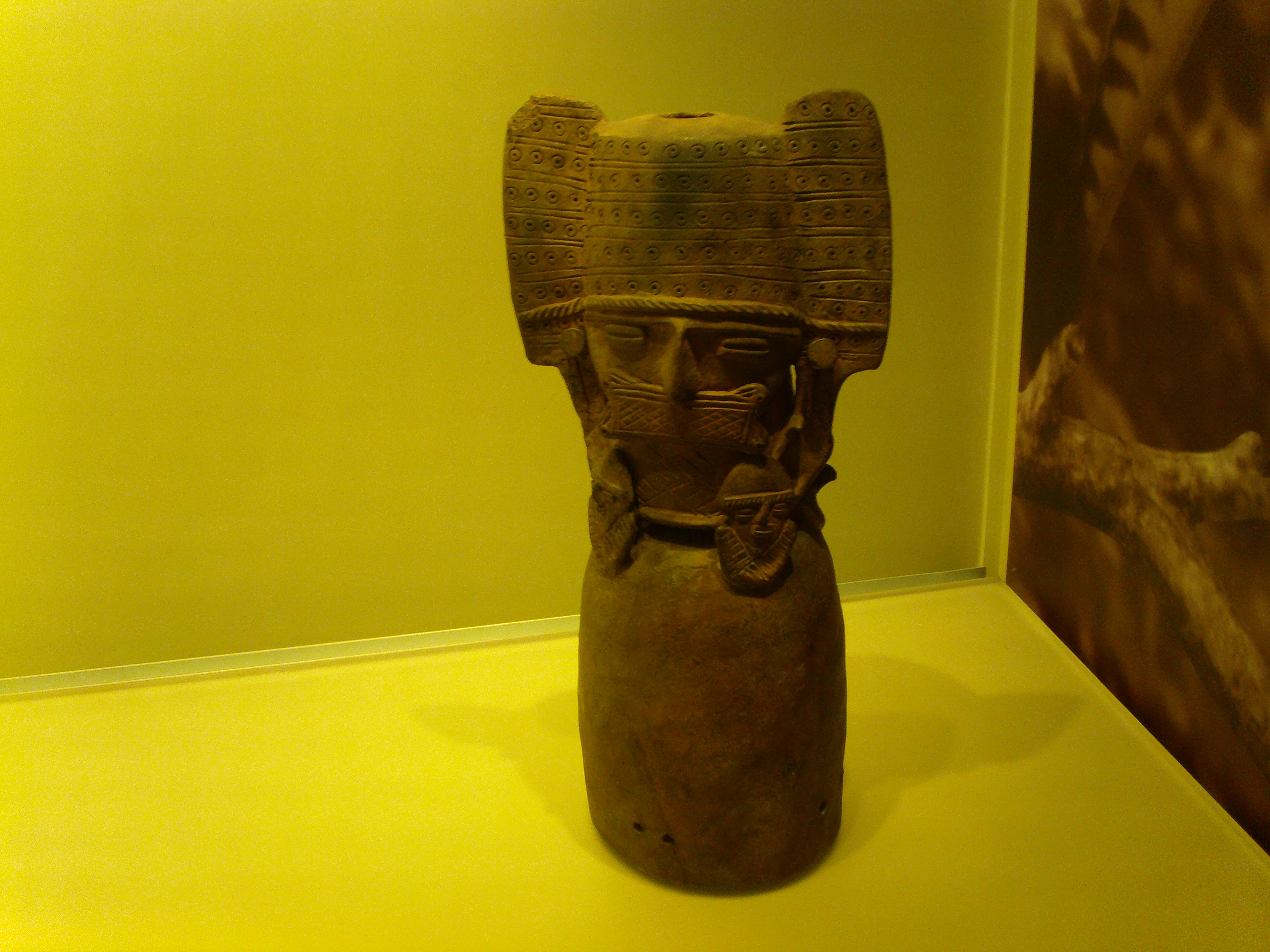 Esta Fotografia Fue Tomada Desde El Museo Del Oro De Bogota